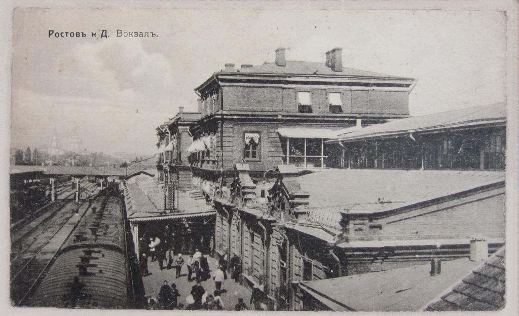 Ростов-на-Дону. Железнодорожный вокзал. Вид на перрон. 1900-1910.